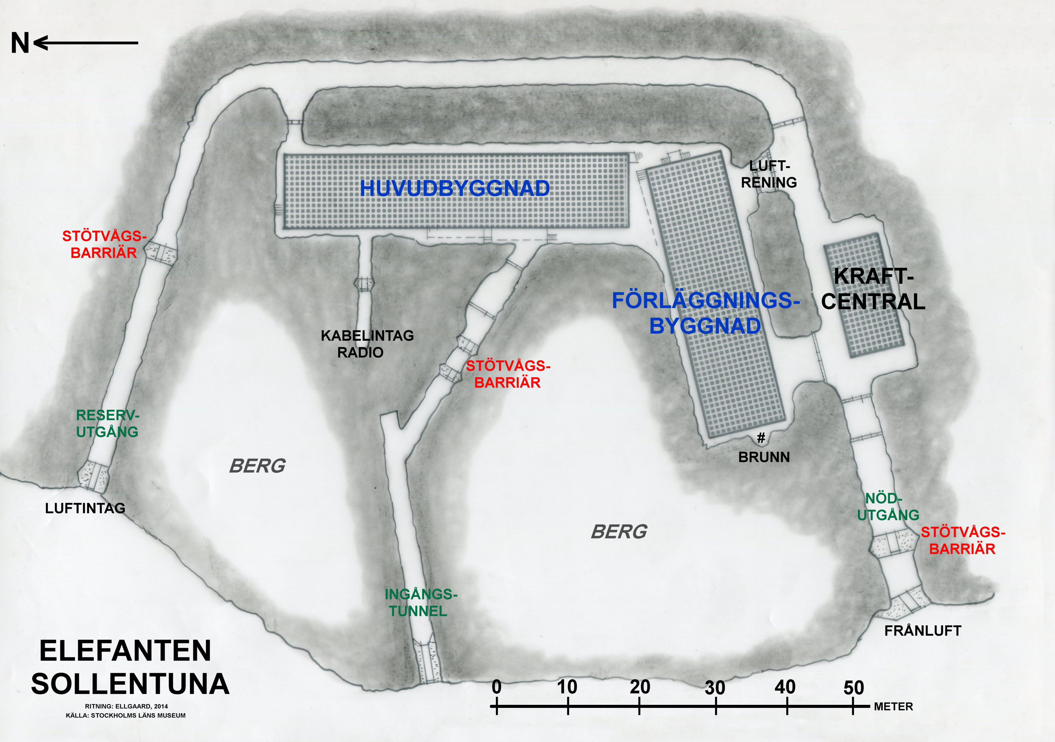 Ledningscentralen "Elefanten" i Sollentuna, planritning, källa: Stockholms läns museum.